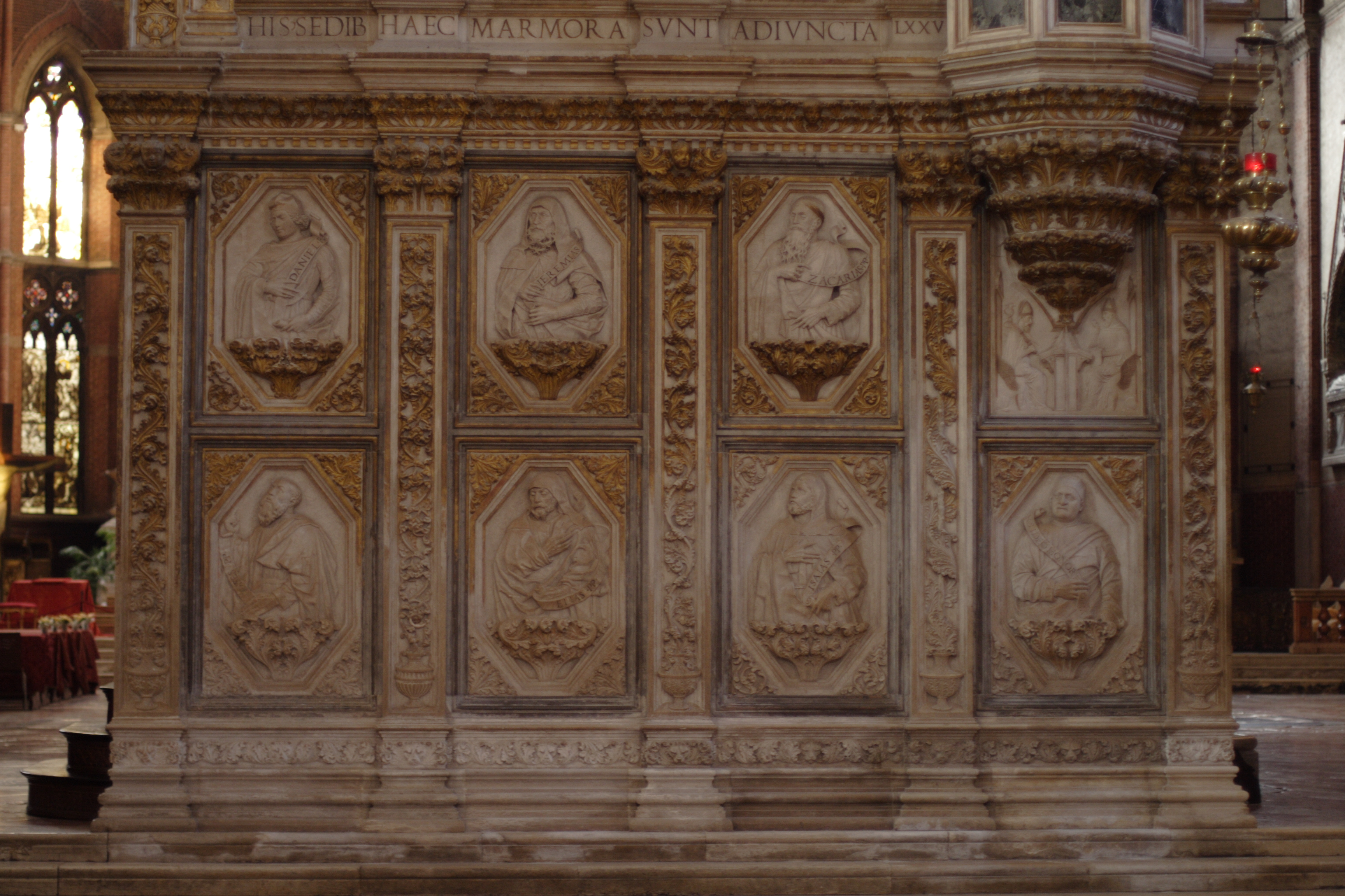 Basilica di Santa Maria Gloriosa dei Frari - The Choir (2)